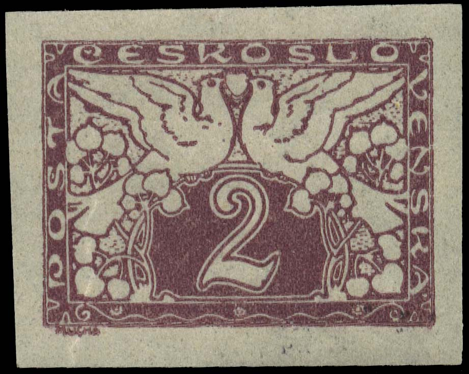 Первая марка спешной почты Чехословакии